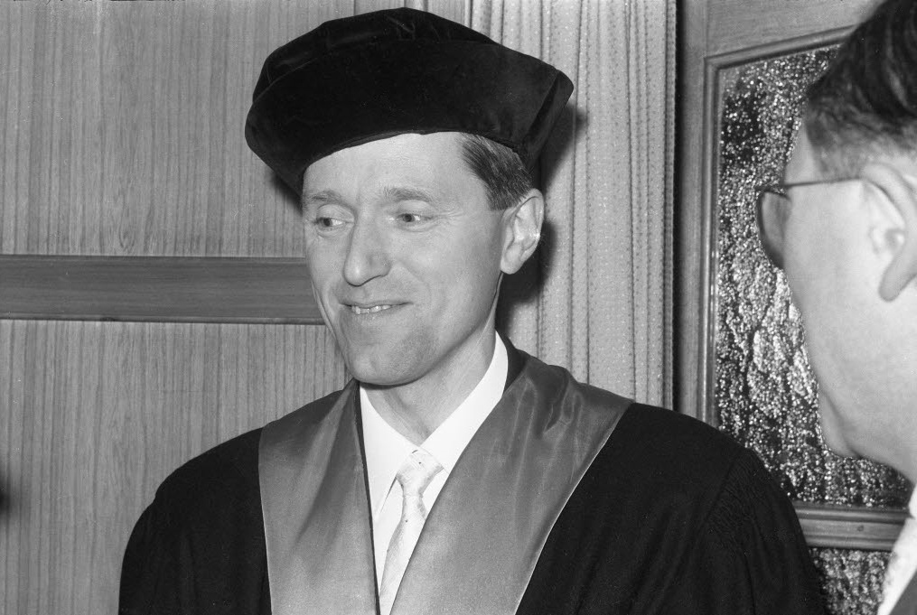 unter den Leitthema "Informationsbegriffe der Umgangssprache und der Wissenschaft" in der Mensa. Im Bild der Zoologe Prof. Dr. B. Hassenstein von der Universität Freiburg als Festredner.